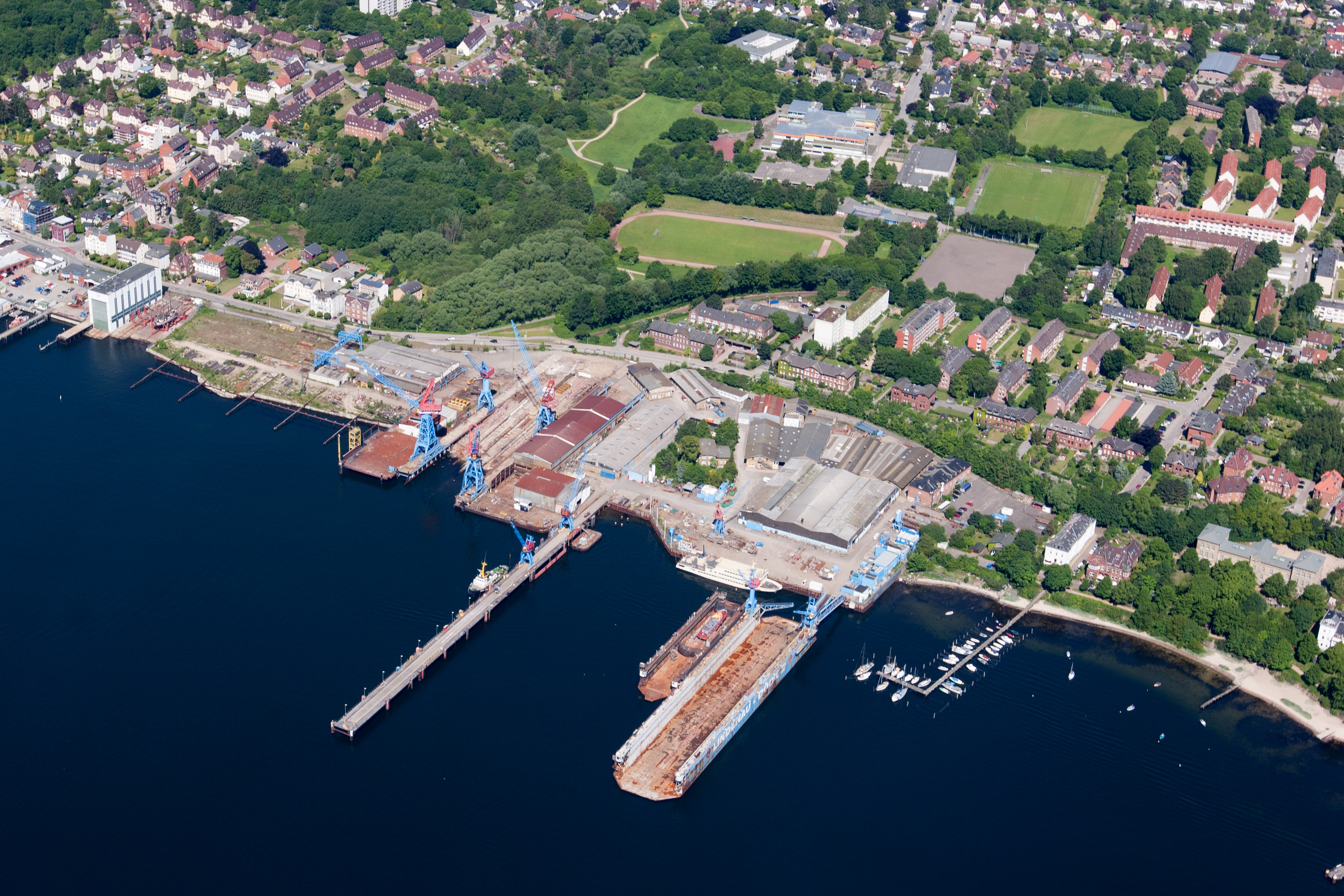 Luftaufnahme der Lindenau Werft in Kiel